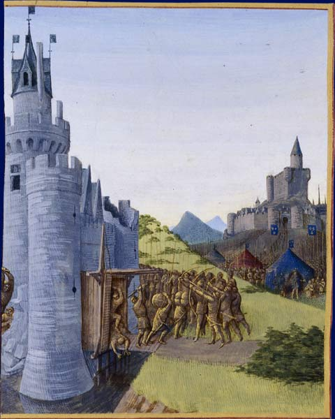 Guerre entre Girard de Cazaubon et le comte de Foix. Reddition de Roger Bernard III Grandes Chroniques de France, enluminées par Jean Fouquet, Tours, vers 1455-1460 Paris, BnF, département des Manuscrits, Français 6465, fol. 290 (Livre de Philippe III le Hardi) Guerre entre Girard de Cazaubon et le comte de Foix : Les troupes du comte de Foix, Roger Bernard III, assaillent le château royal dans lequel s'est réfugié Girard de Cazaubon. Ce dernier échappe au massacre en s'enfuyant. Reddition de Roger Bernard III (en arrière-plan à droite) : Philippe III le Hardi, assiégeant le château de Foix, reçoit les envoyés du comte Roger Bernard III lui annonçant sa reddition.